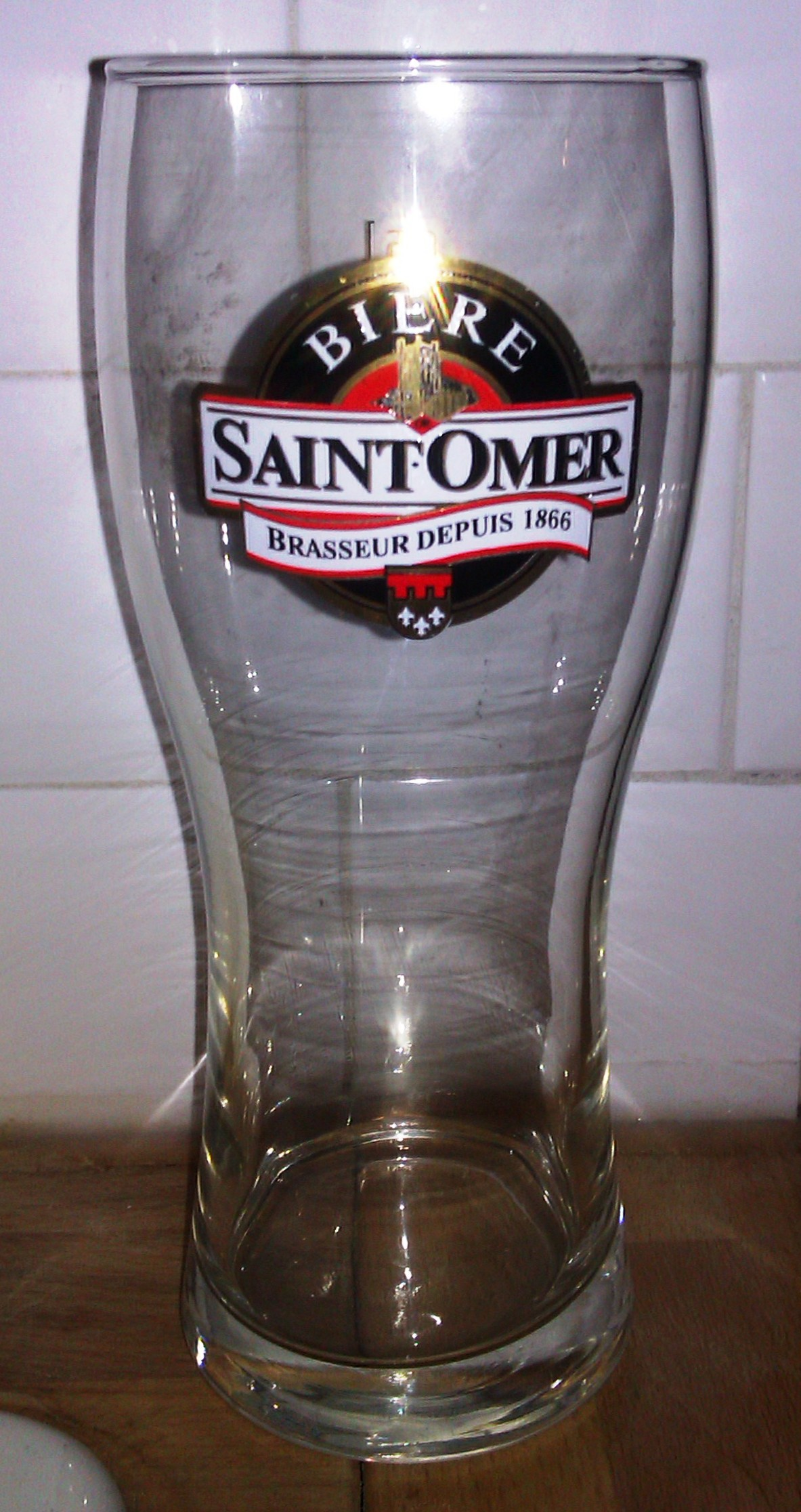 Pinte de bière Saint-Omer 50cl